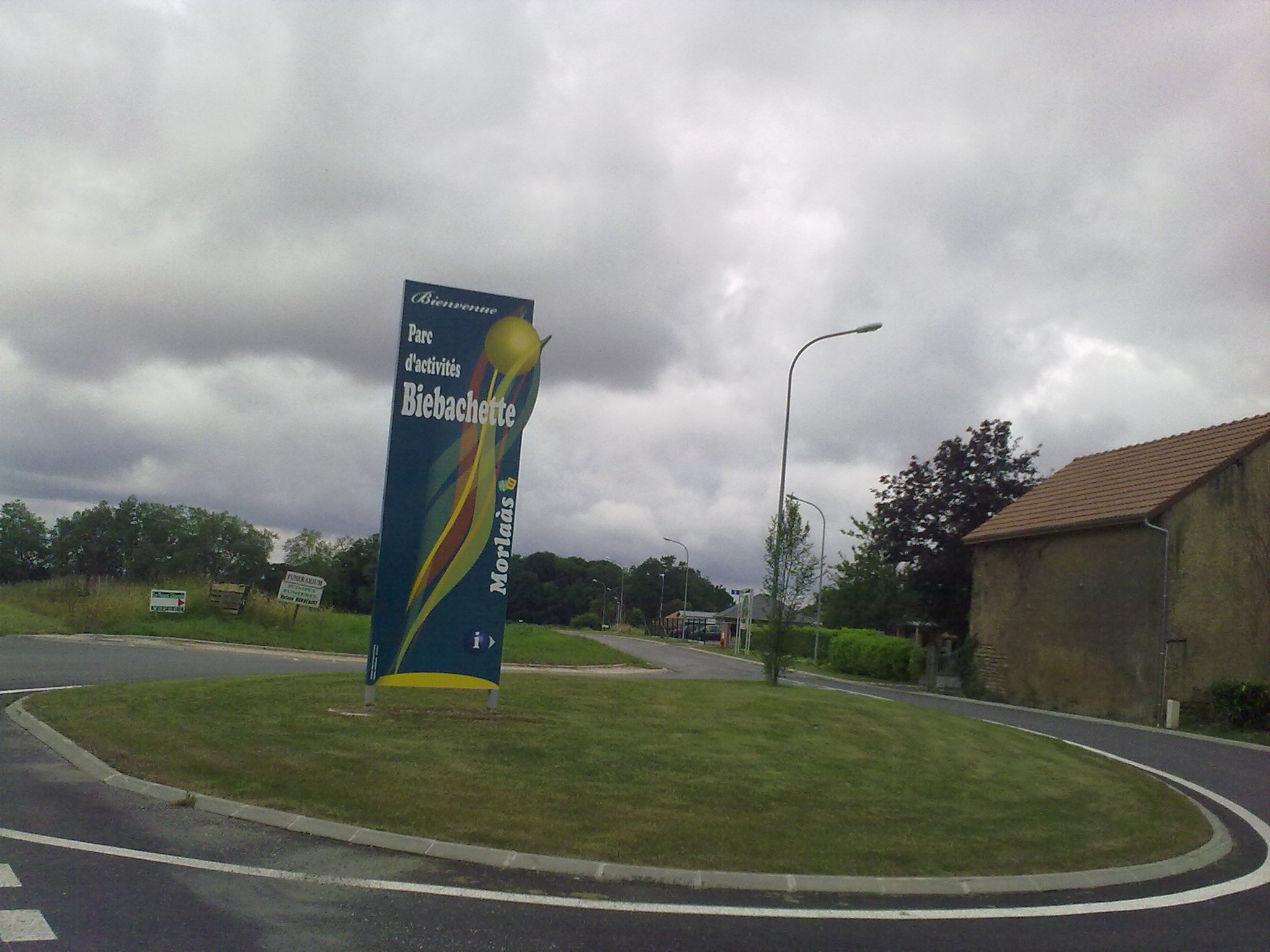 Morlaàs